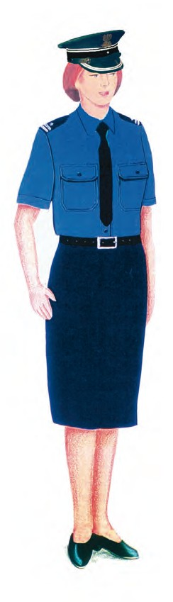 Ubiór służbowy SG funkcjonariuszy noszących umundurowanie SP z koszulą koloru niebieskiego, krawatem, spódnicą i czapką garnizonową.